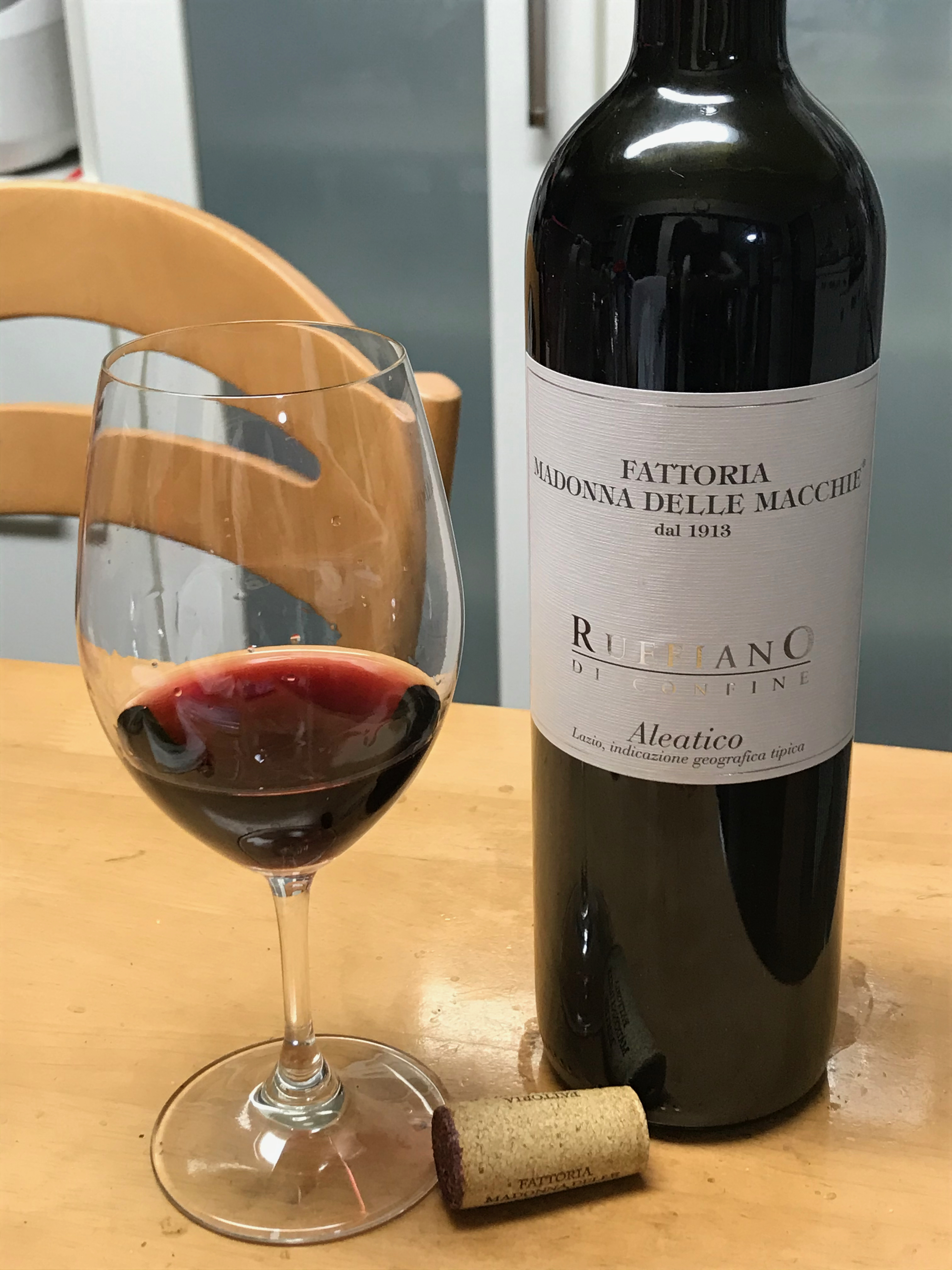 イタリアのラツィオ州北部のワイン生産者による、アレアティコ種の辛口赤ワイン。バラや湿気を帯びた森の土のアロマが特徴的。